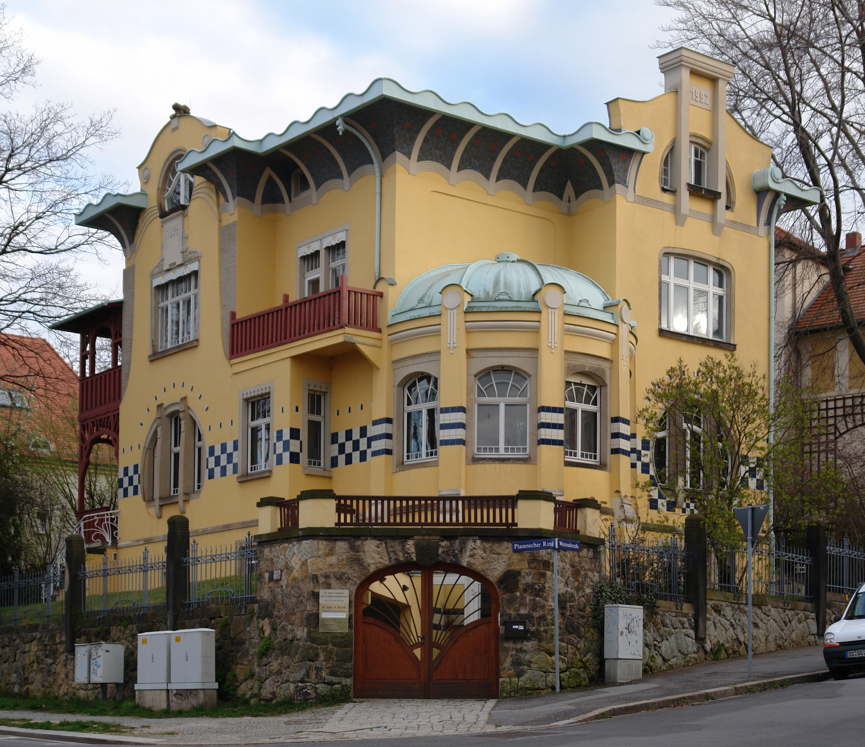 Villa Westendstraße Ecke Plauenscher Ring in Dresden-Plauen